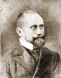 Österreichischer Politiker, Reichsratswahl 1907, Name siehe Dateiname